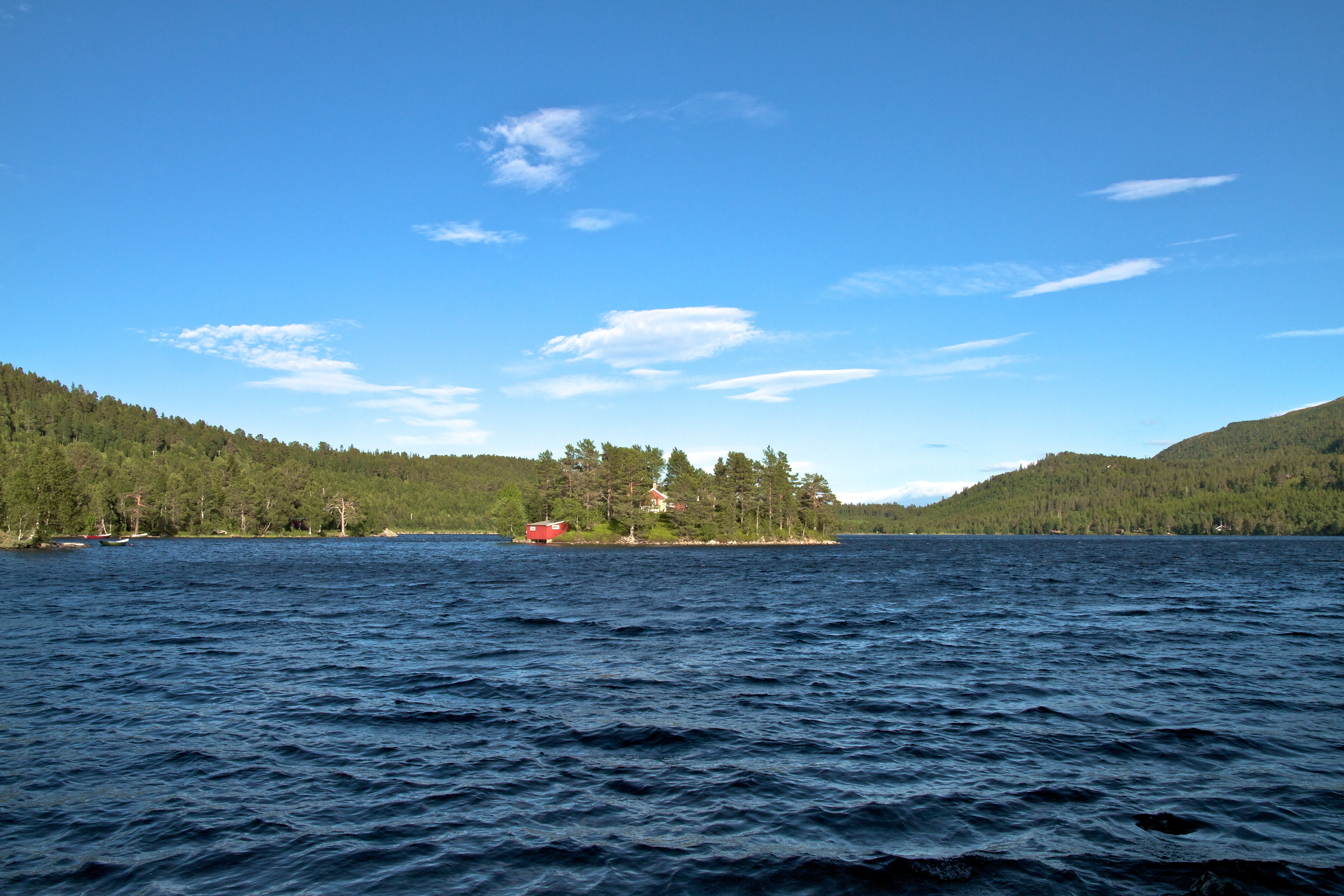 Frilsjøen